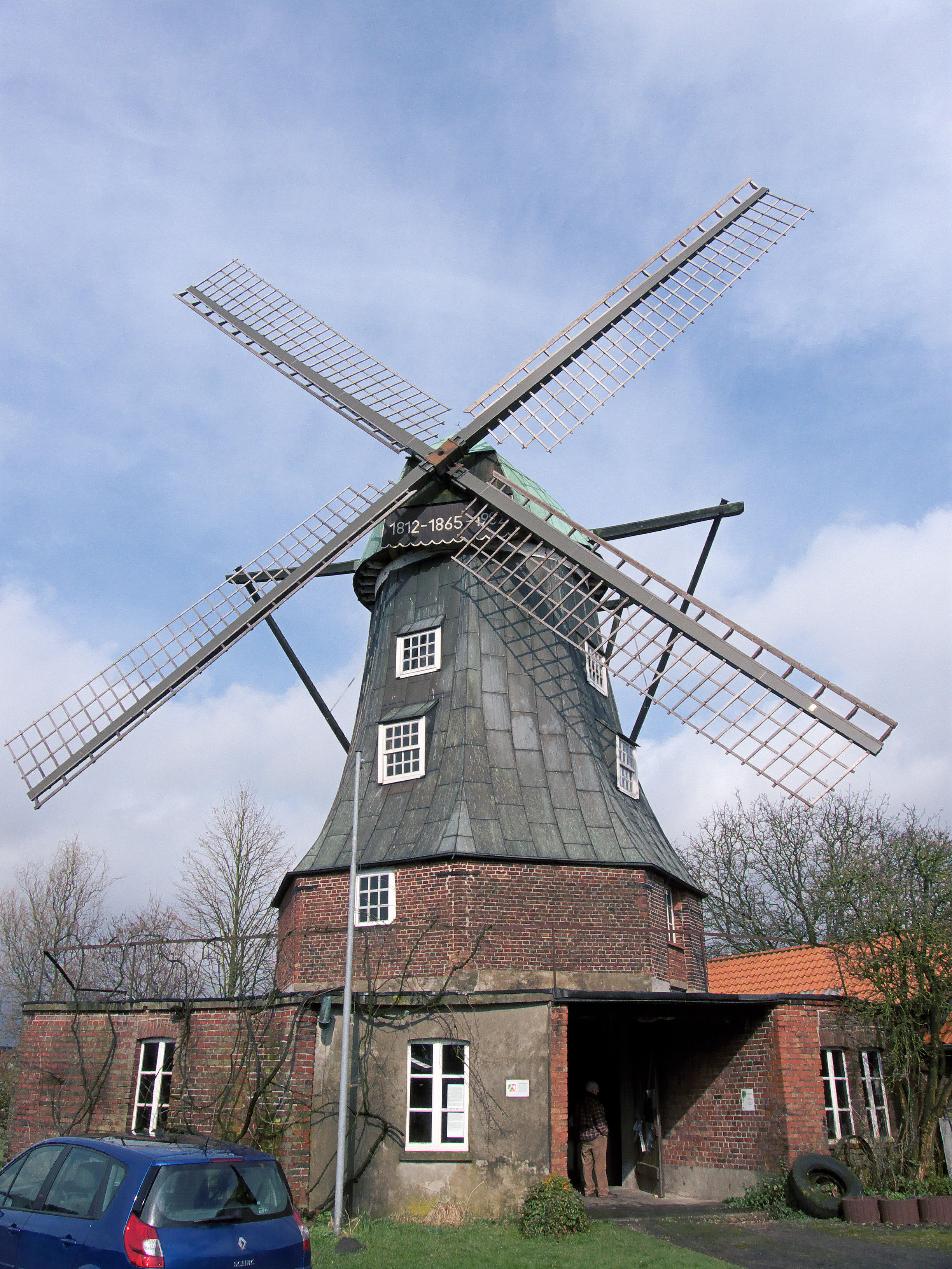 Windmolen Windmühle Menke, Südlohn, Duitsland